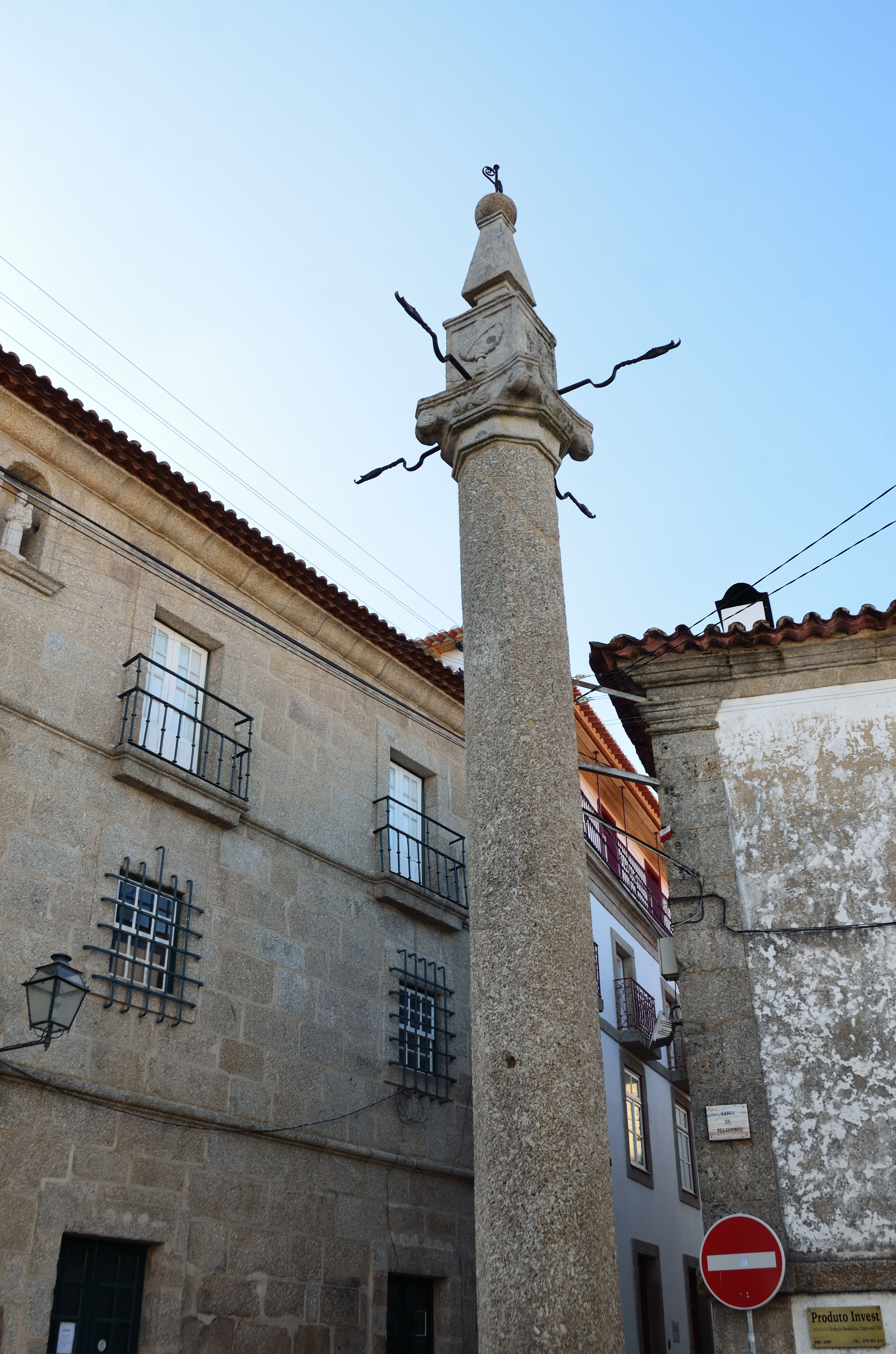 Pelourinho de Alpedrinha